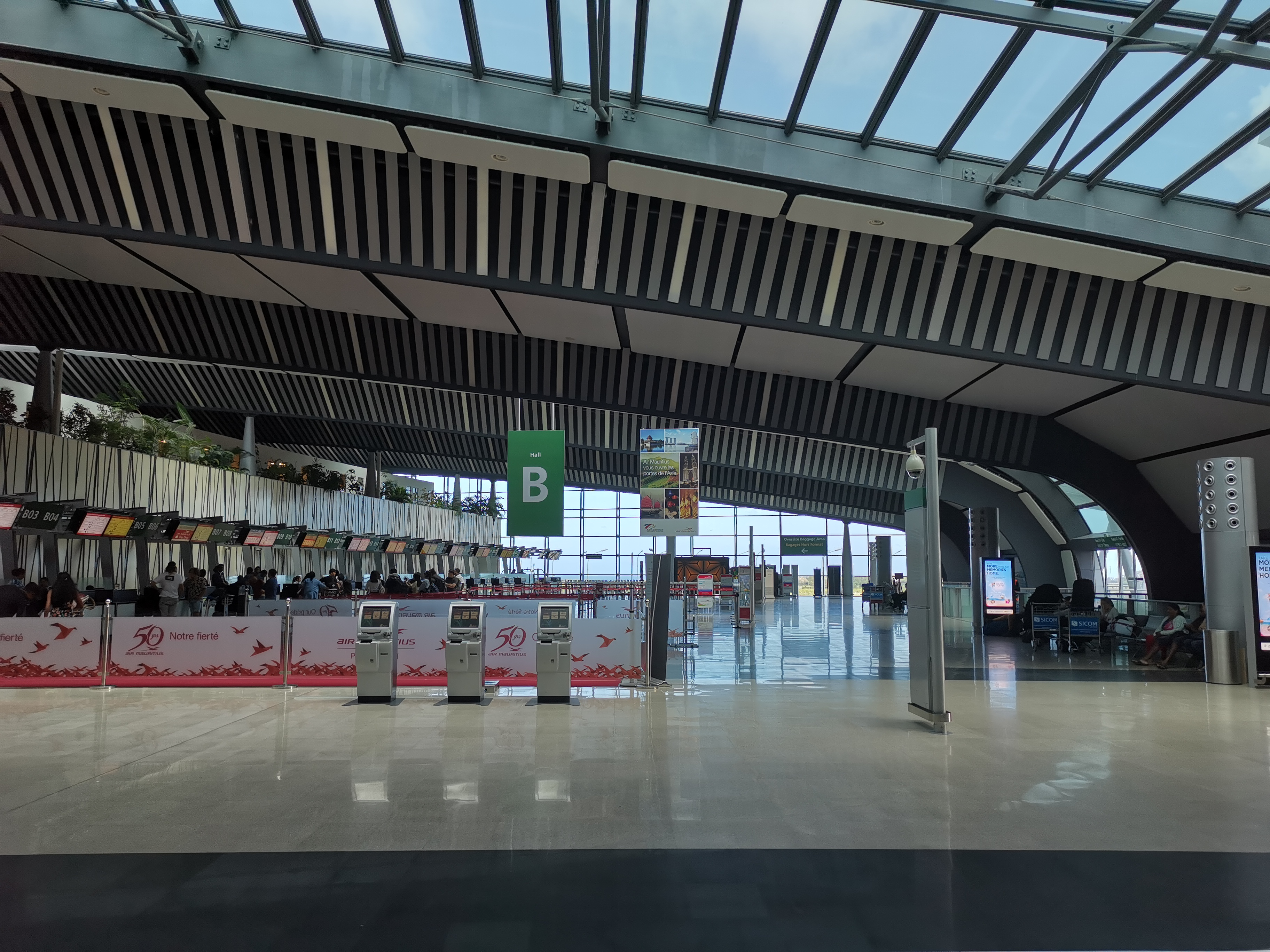 Flughafen in Mauritius